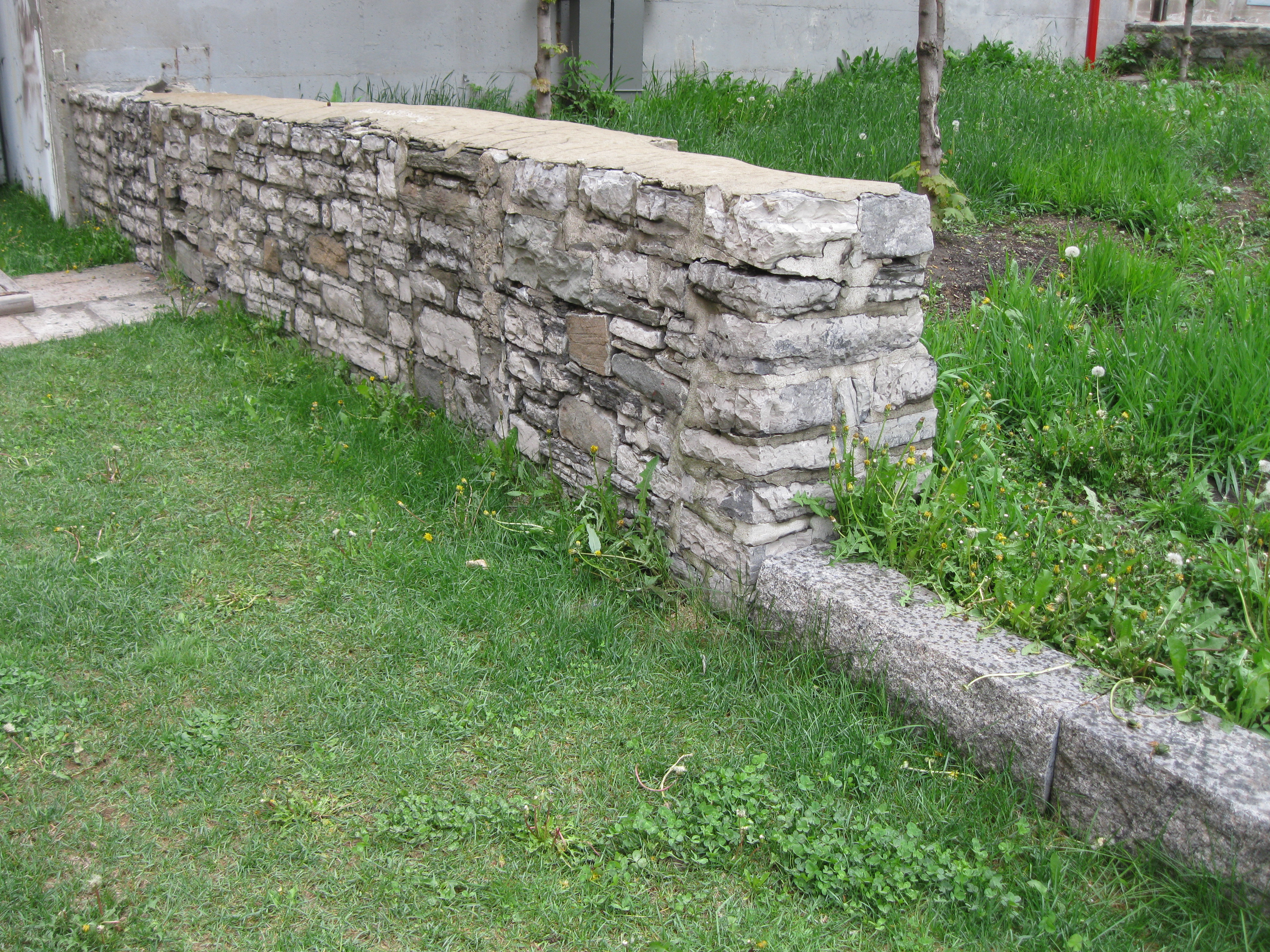 L'îlot des Palais est un parc urbain de Québec sur un site archéologique. Il demeure à cet endroit des vestiges du palais de l'intendant de la Nouvelle-France. Un bâtiment en brique rouge est une ancienne brasserie. radio-canada.ca